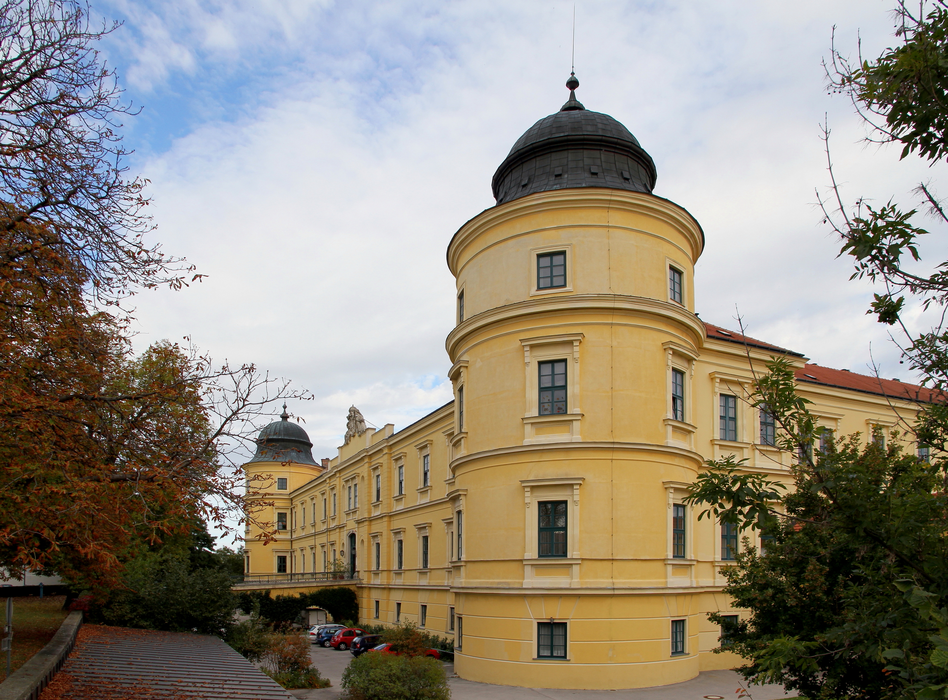 Westsüdwestansicht des Schlosses Judenau in der niederösterreichischen Marktgemeinde Judenau-Baumgarten. Eine dreiflügelige Anlage mit vier dominanten runden Ecktürmen. In mehreren Bauphasen errichtet, vorwiegend im 2. Viertel des 17. Jahrhunderts und 1. Viertel des 18. Jahrhunderts. 1854 erfolgte eine Sanierung und ein teilweiser Neubau.